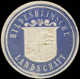 Sealing stamp Title: Hildesheimsche Landschaft Description: blau, weiß, geprägt Place: Hildesheim size: 3 cm